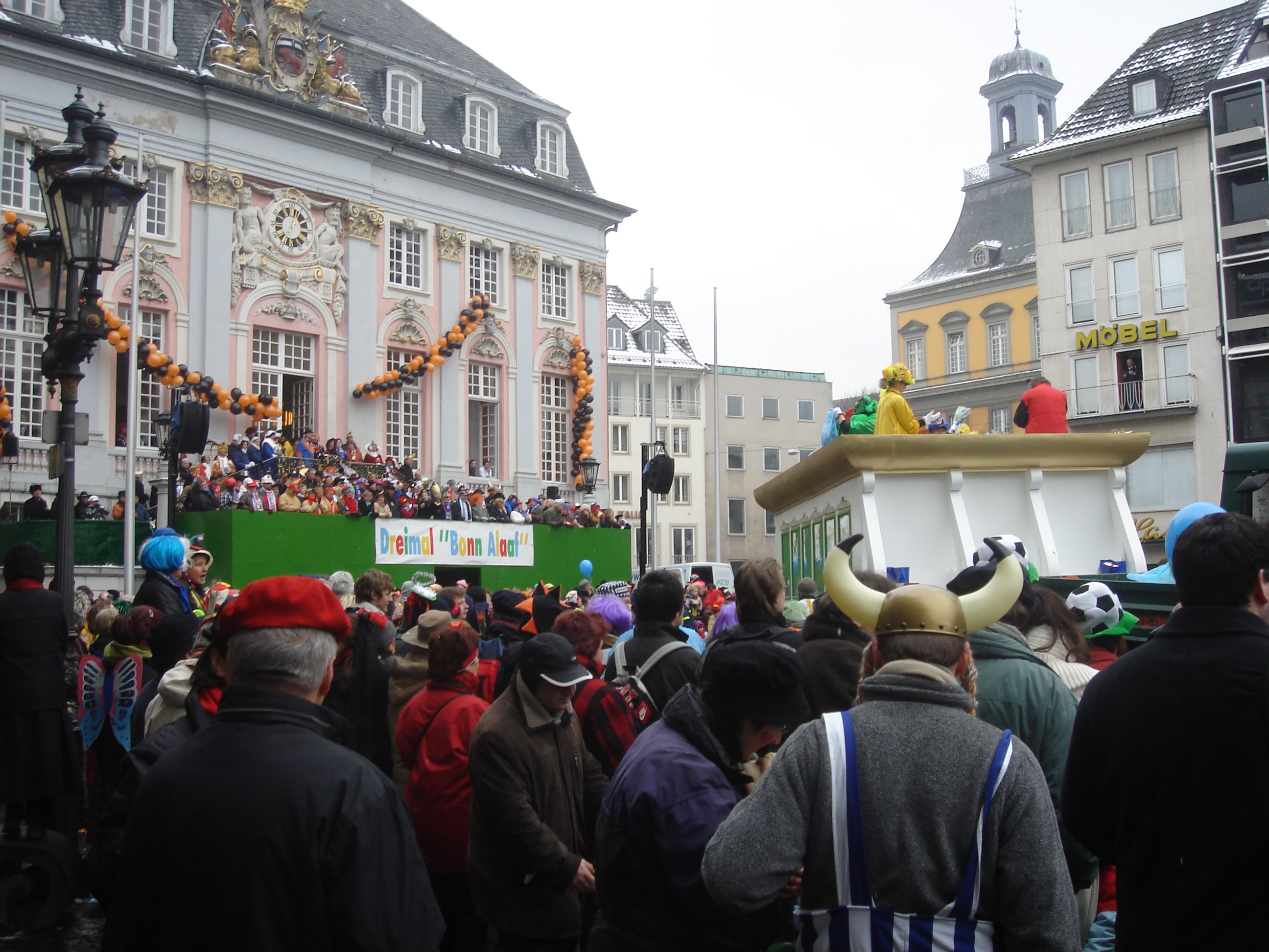 Rosenmontagszug in Bonn, Germany, 2006.